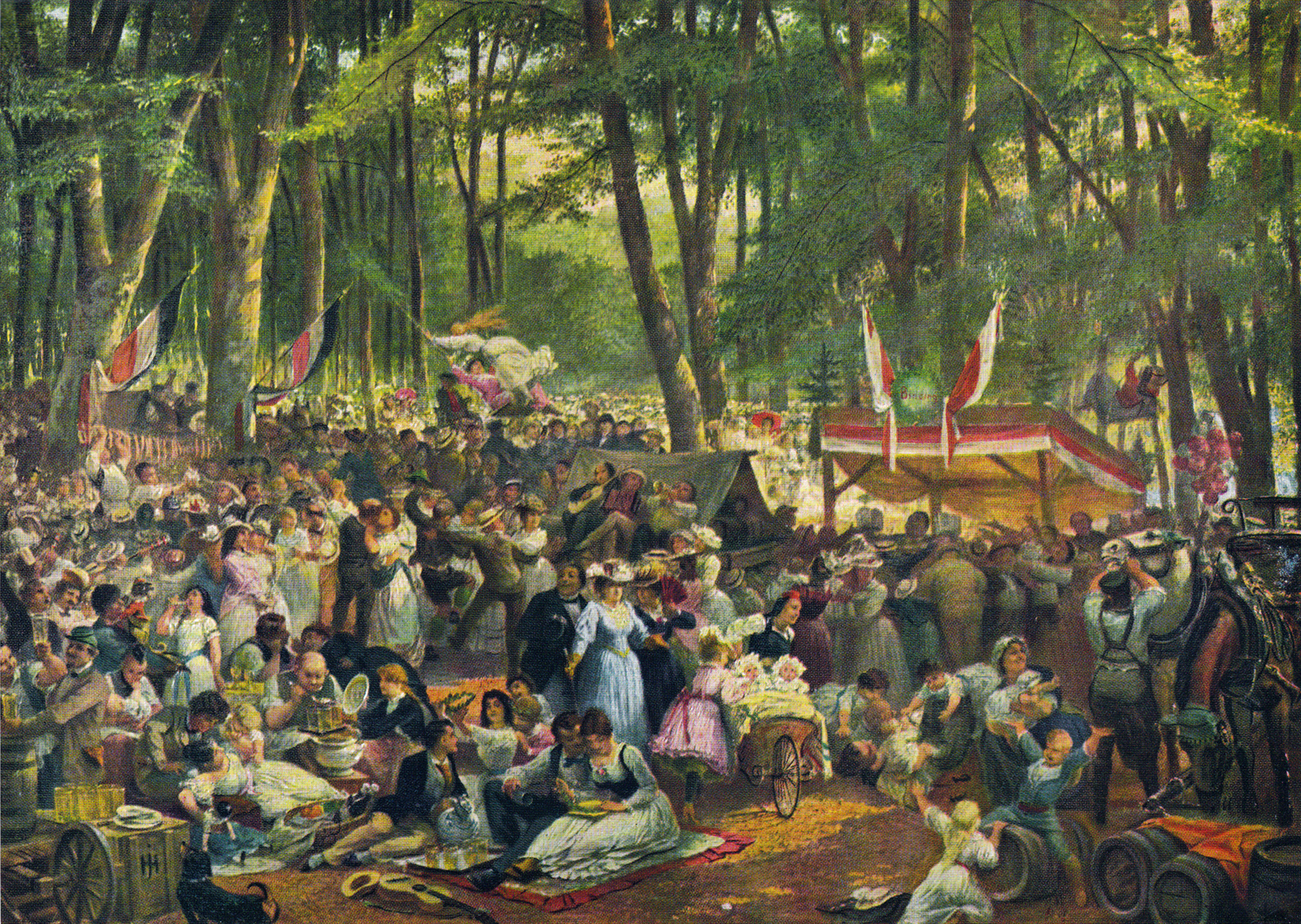 Wälchestag